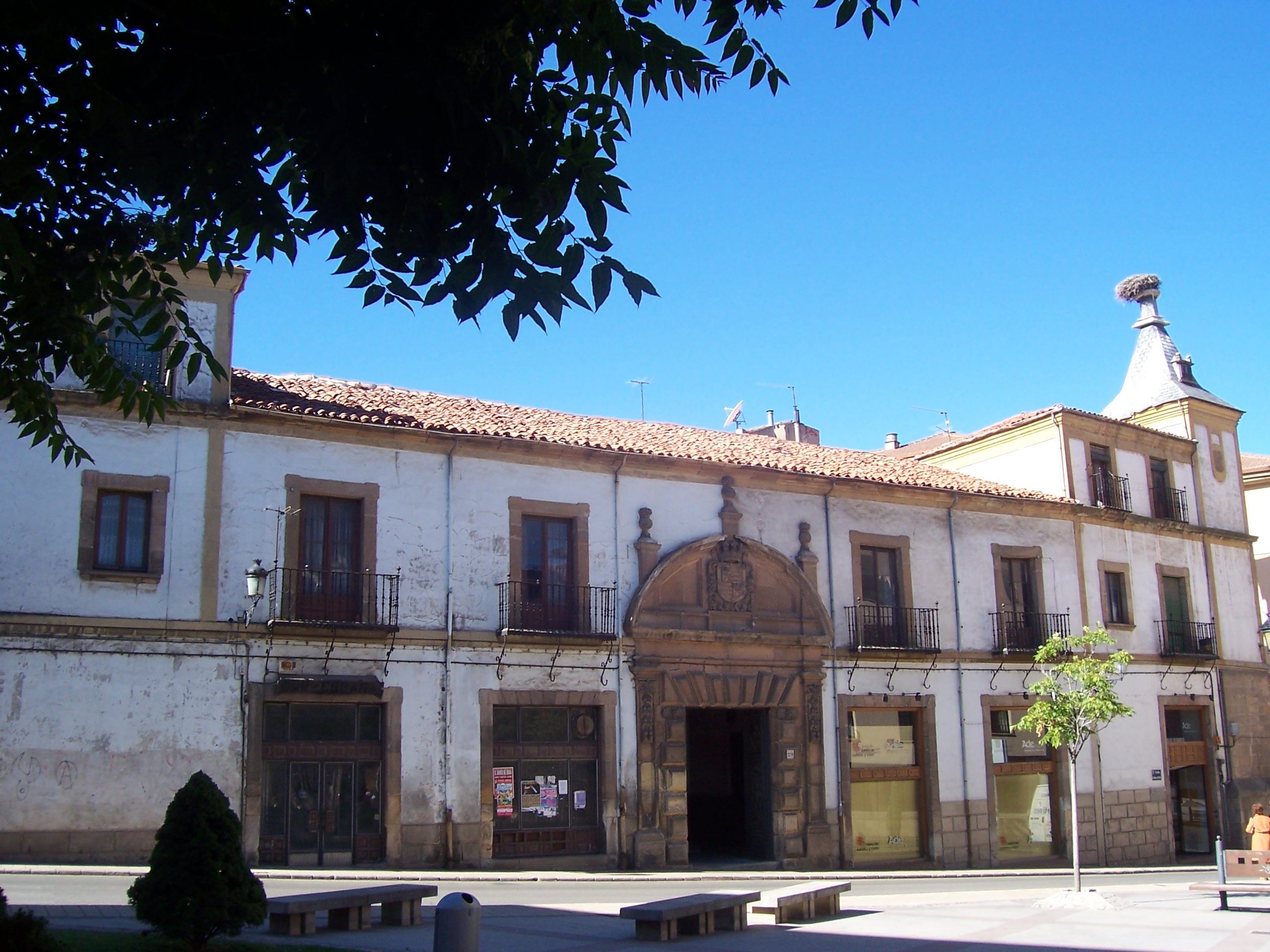 Palacio de los Marqueses de Alcantara (Soria)